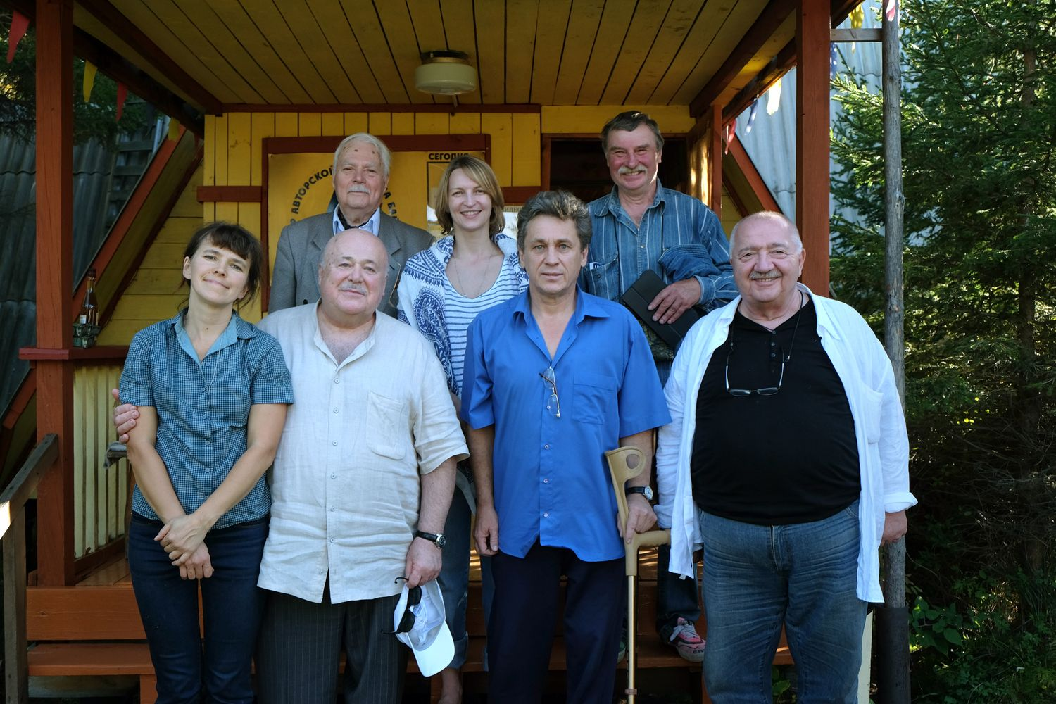 Robert Sturua, Alexandr Kalyagin